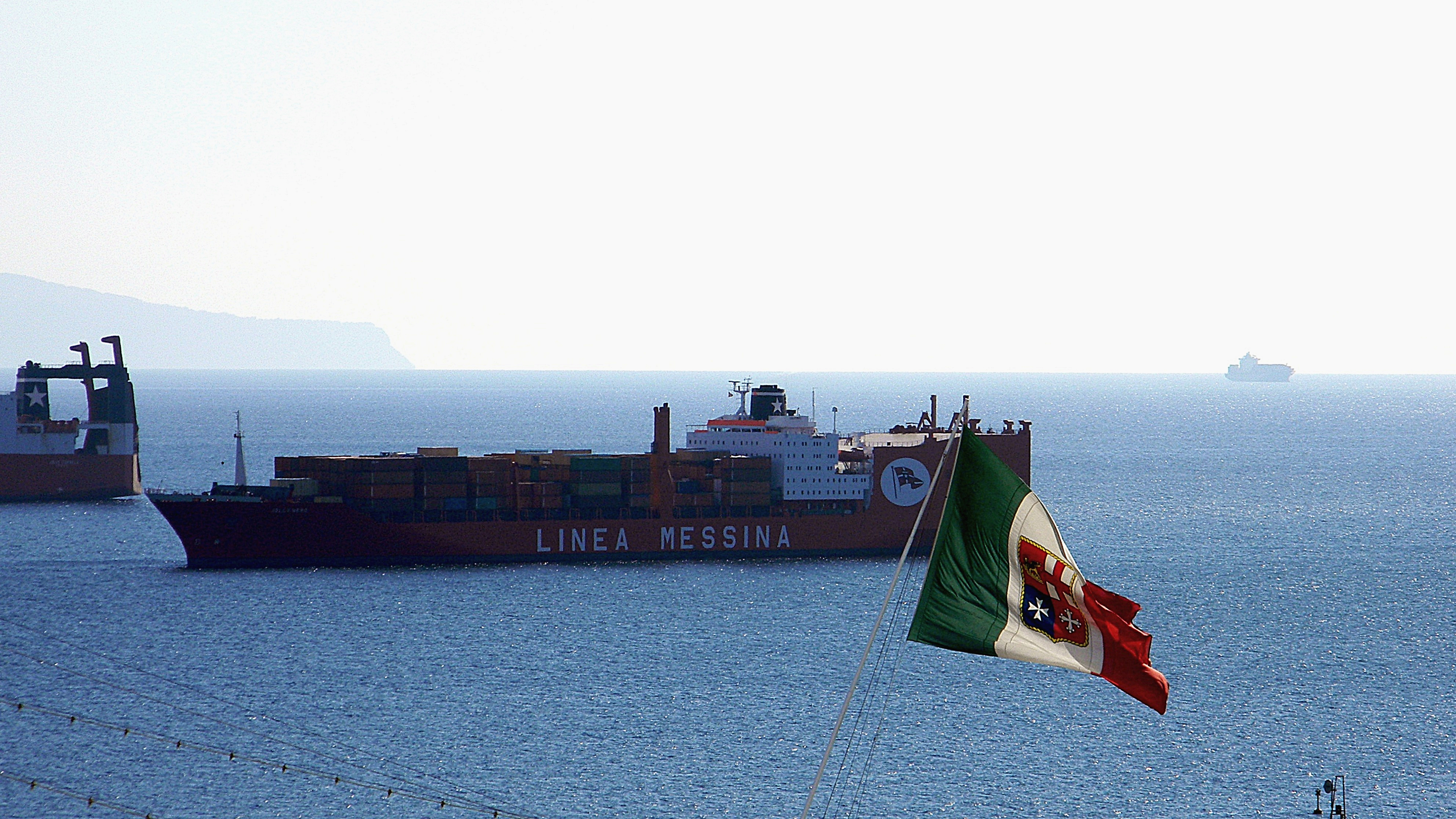 Nave Jolly Nero. Golfo di Napoli